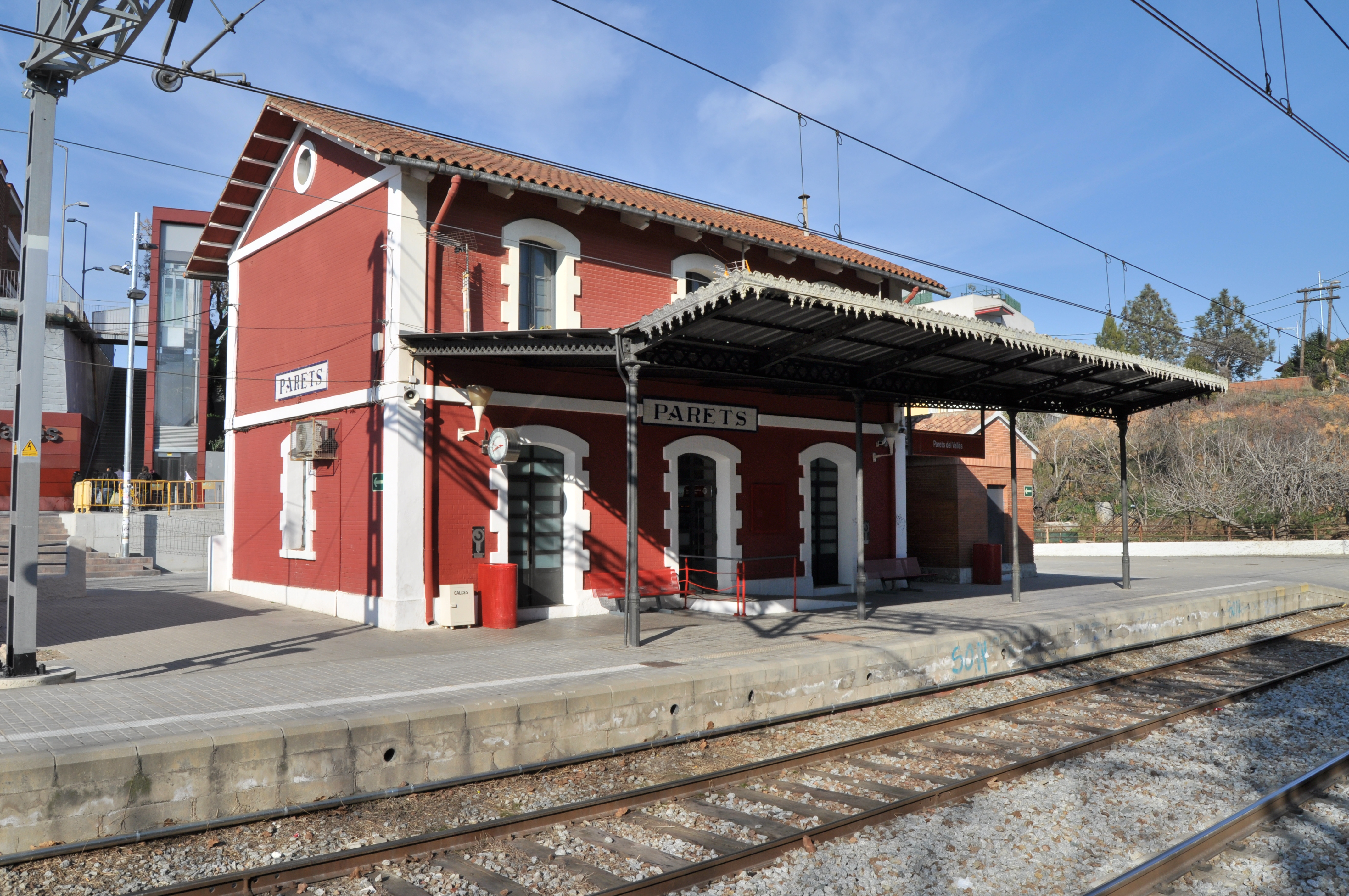 Estación de Parets del Vallès (provincia de Barcelona).